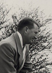 Monument "Hans Brinker"op de Woerdersluis tijdens een bezoek van David Dodge. Aangekocht in 1977 van fotograaf C. de Boer. Identificatienummer 54-004636